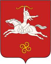 Герб Салаватского района Башкортостана